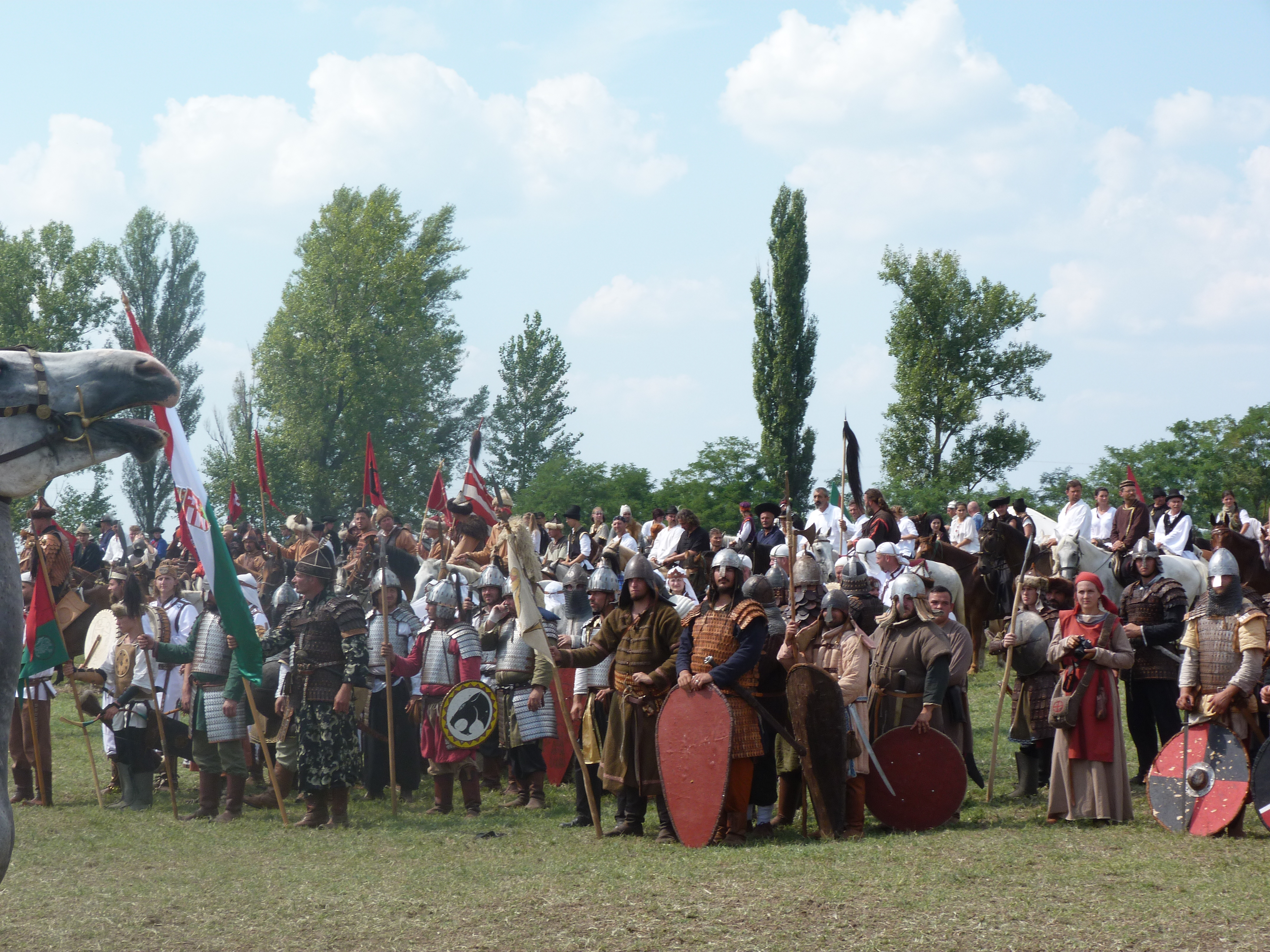 A felvétel 2014. augusztus 9-én, szombaton készült Bugacon. Kurultáj, magyar törzsi gyűlés. ©© Derzsi Elekes Andor, Budapest 2014, You are authorised to use this photo under Creative Commons – even for commercial, for profit purposes. The photo must be attributed to Derzsi Elekes Andor. All of the photos and vids in the Metapolisz DVD line are under Creative Commons and can be used even for commercial – for profit – purposes. Recommended Citation Derzsi Elekes Andor: Metapolisz DVD line